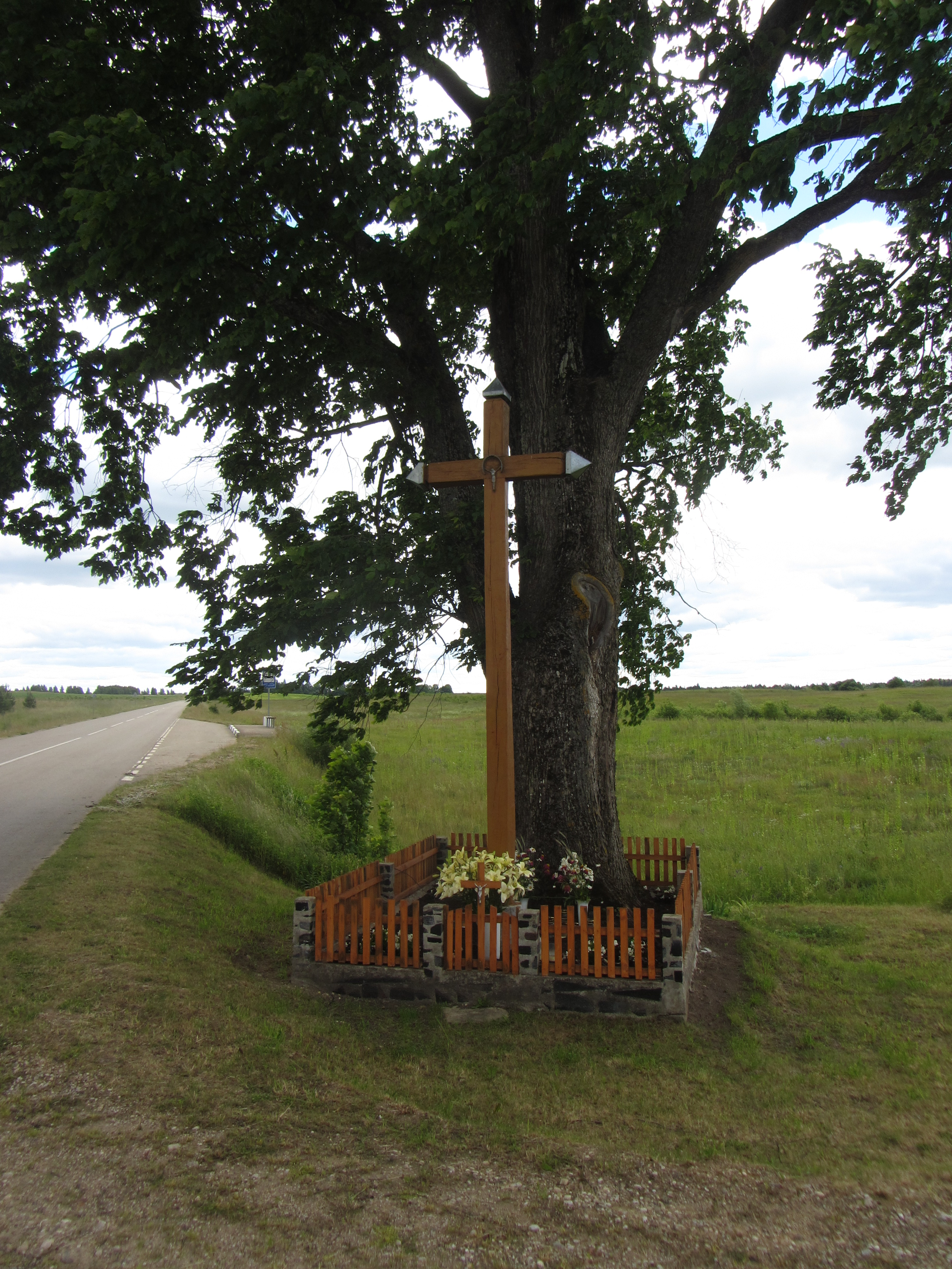 Daukšiai 18102, Lithuania